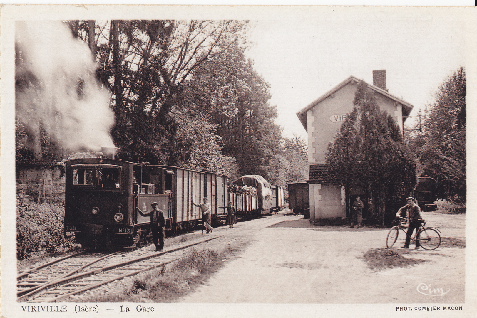 Carte postale ancienne éditée par CIM (Combier imprimeur à Mâcon) :VIRIVILLE - La Gare